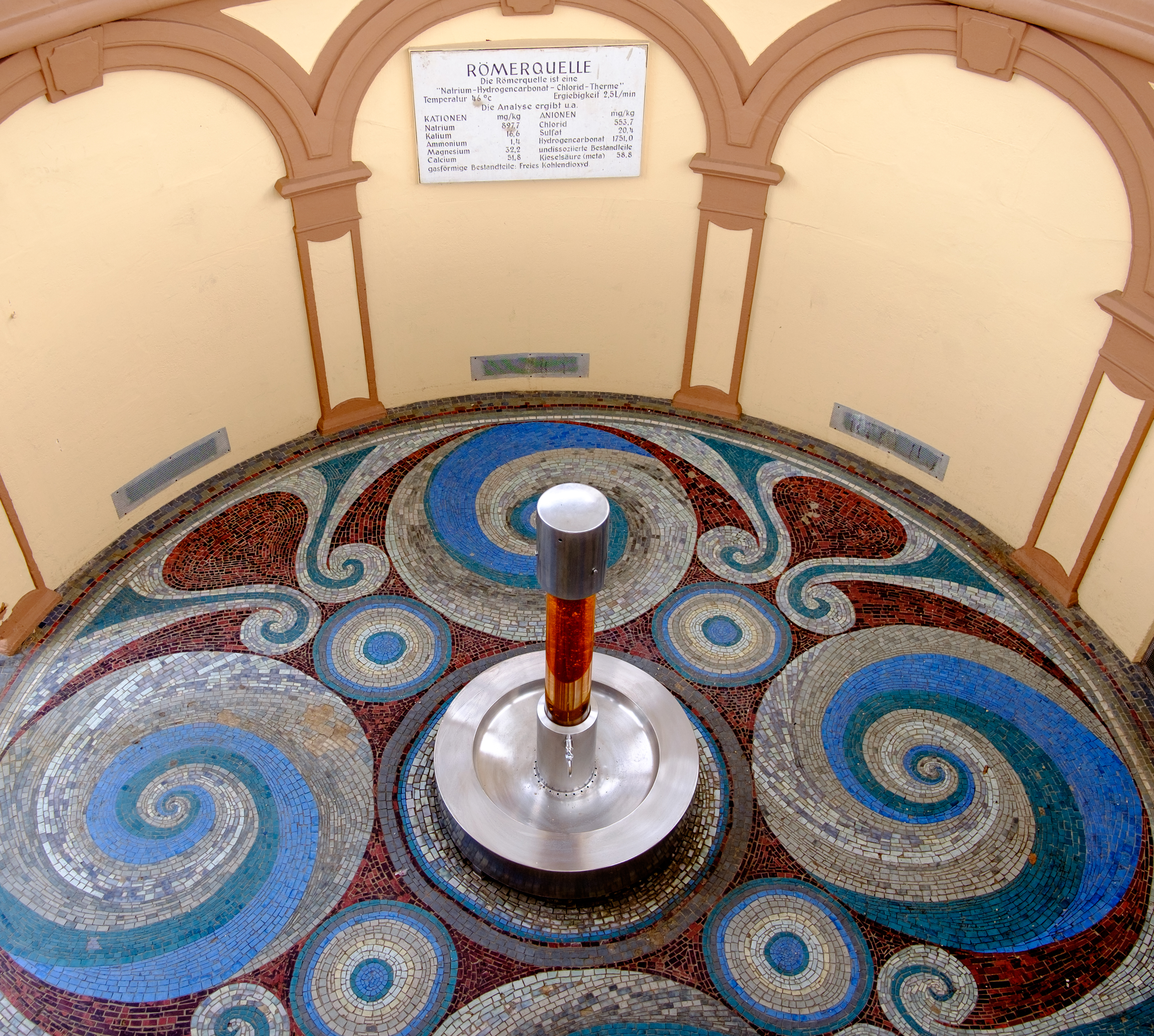 Heilquelle "Römerquelle" in Bad Ems